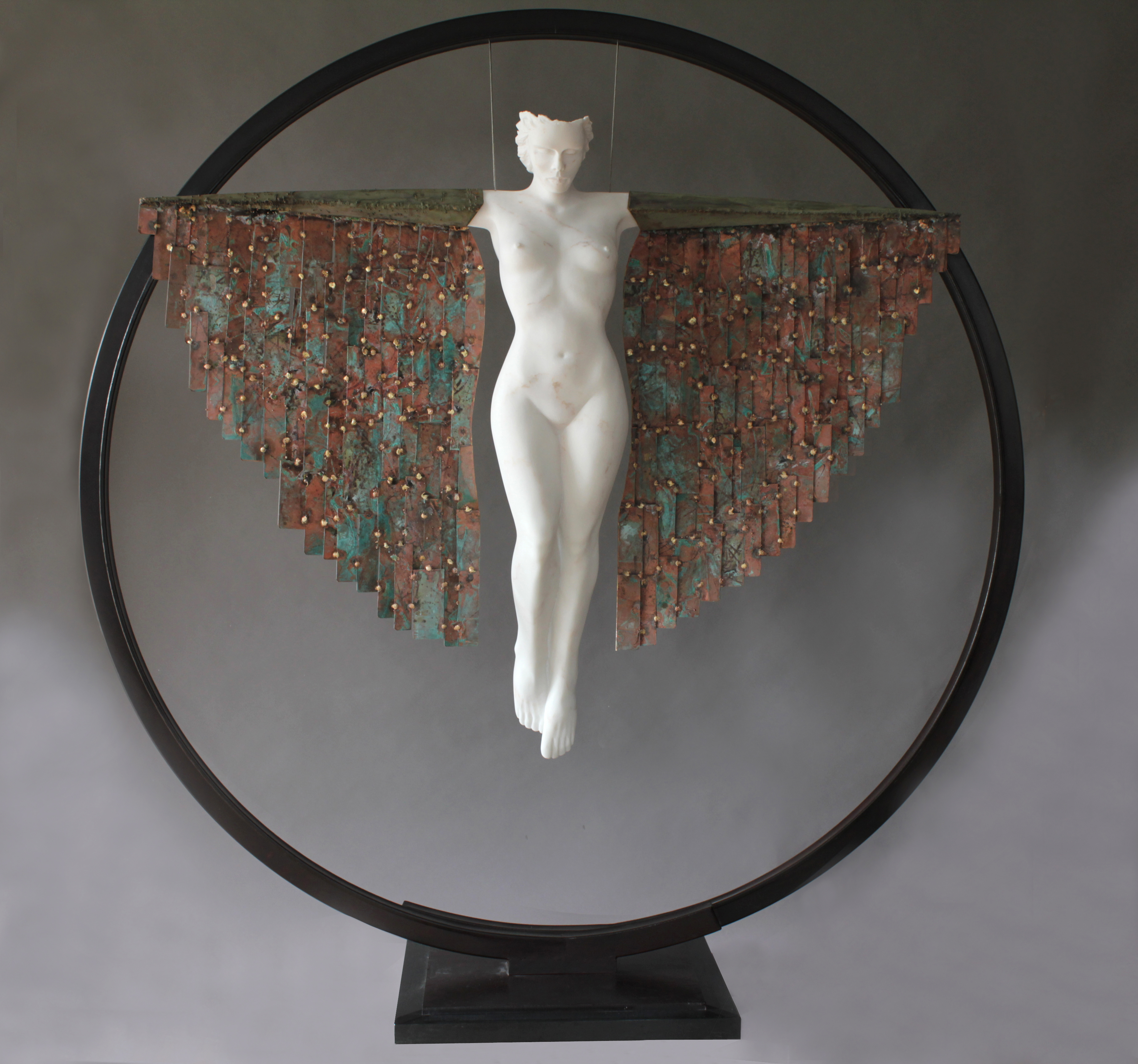 Metamorfose